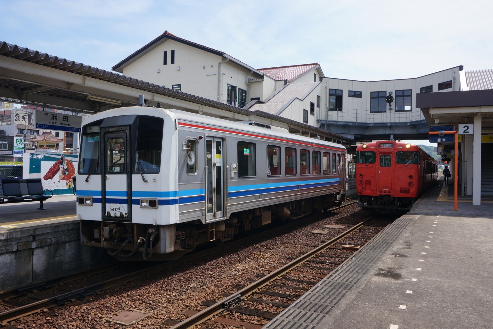 浜田駅で停車中の山陰本線の普通列車